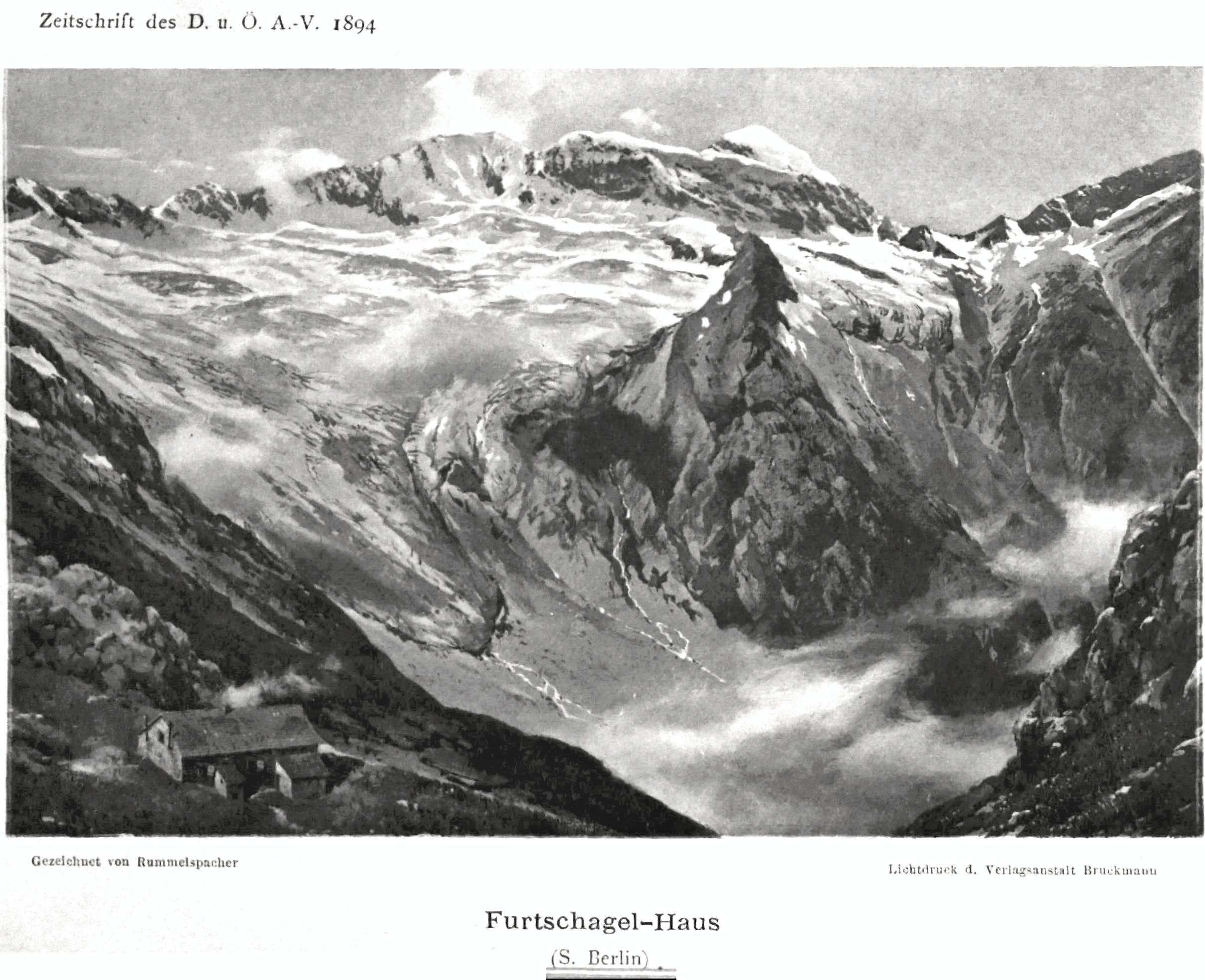 Furtschagel-Haus aus Zeitschrift des Deutschen und Oesterreichischen Alpenvereins 1894 Band 25